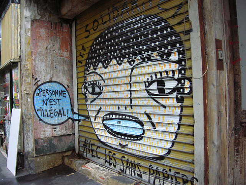 Photo de Gilles Itzkovitchklein, du 15 septembre 2005. Cette photographie a été prise à Paris, à l'extrémité de la rue de Tanger en allant vers le boulevard de la Chapelle. Source : [1]